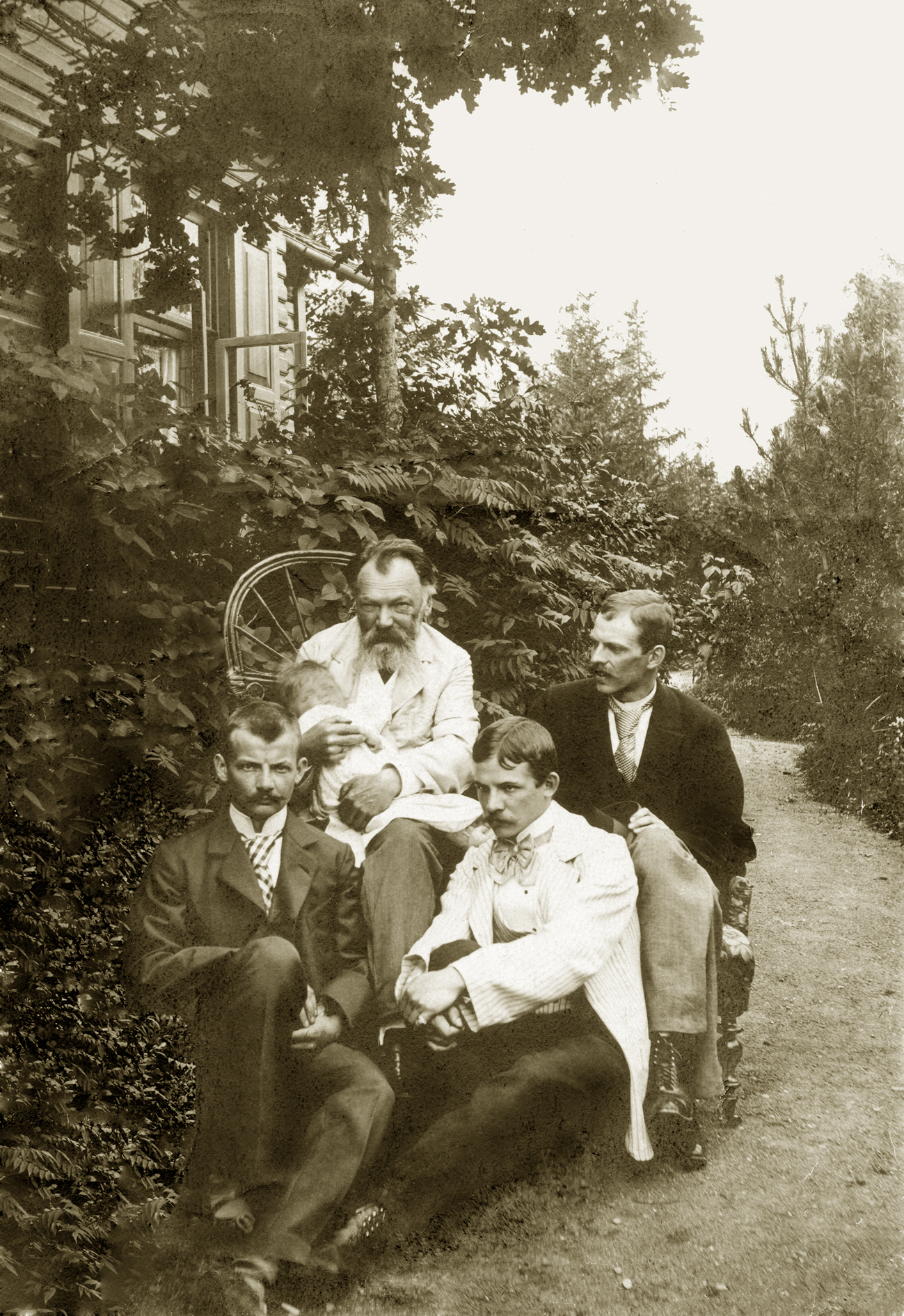 Профессор Бернгард Августович Кербер с младшими сыновьями